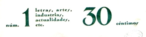 Gaceta de Galicia